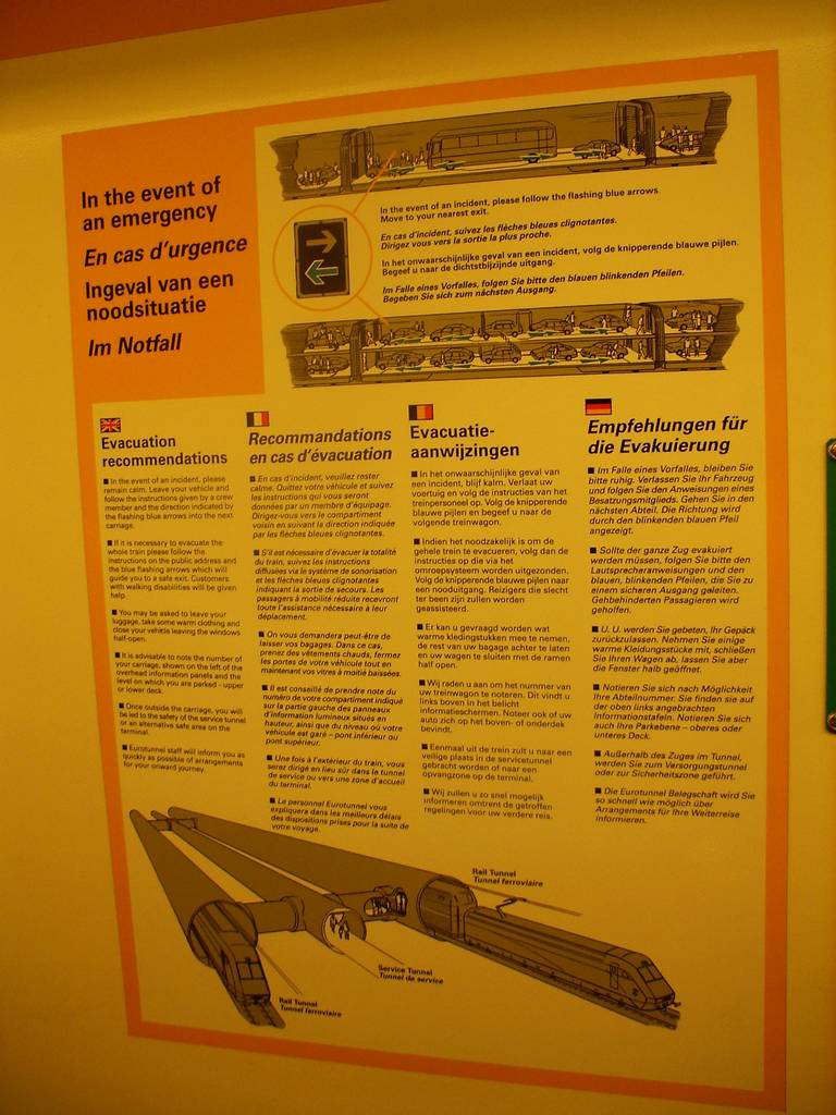 Consignes de sécurité à bord du Shuttle